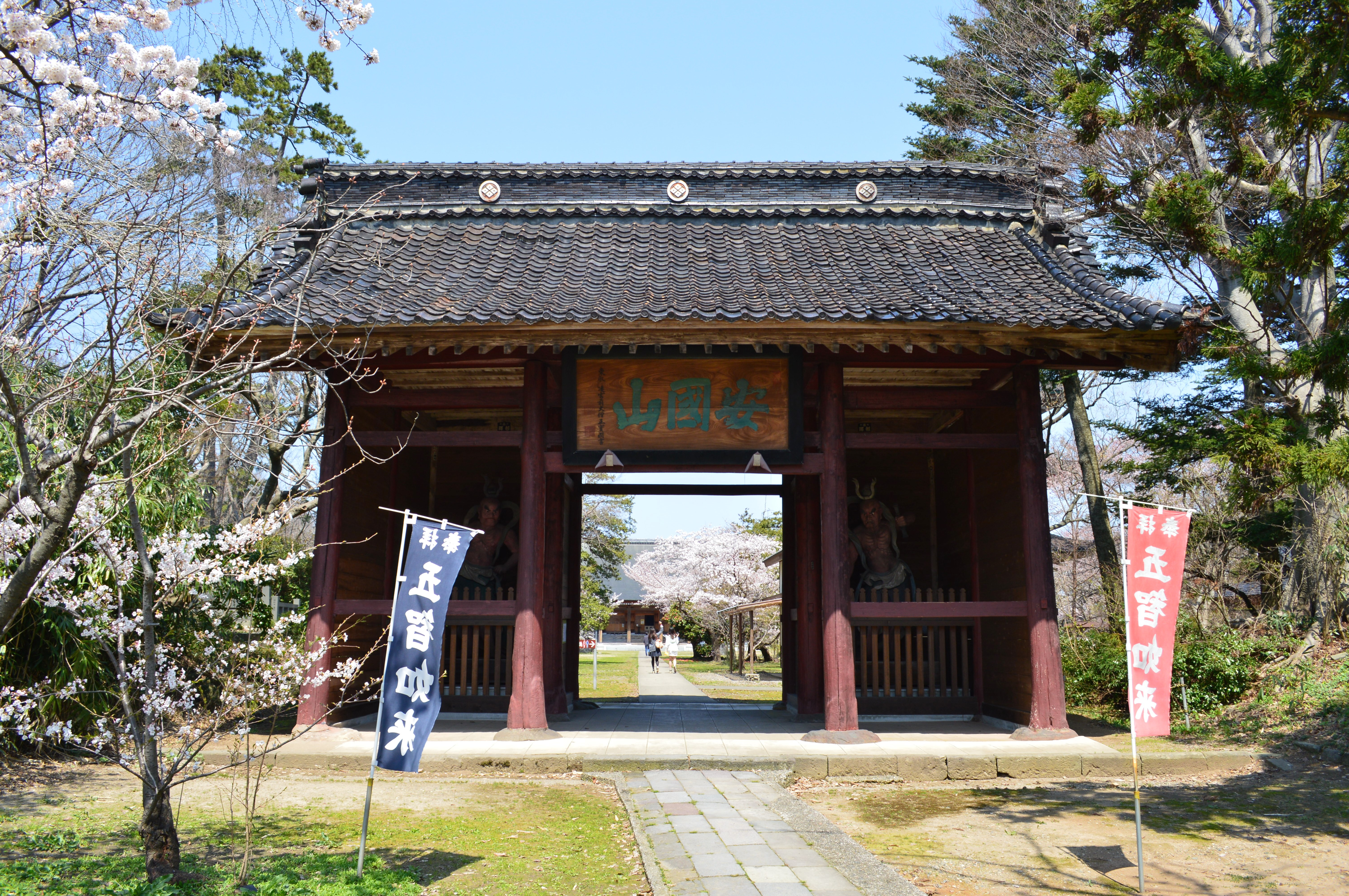 五智国分寺 山門